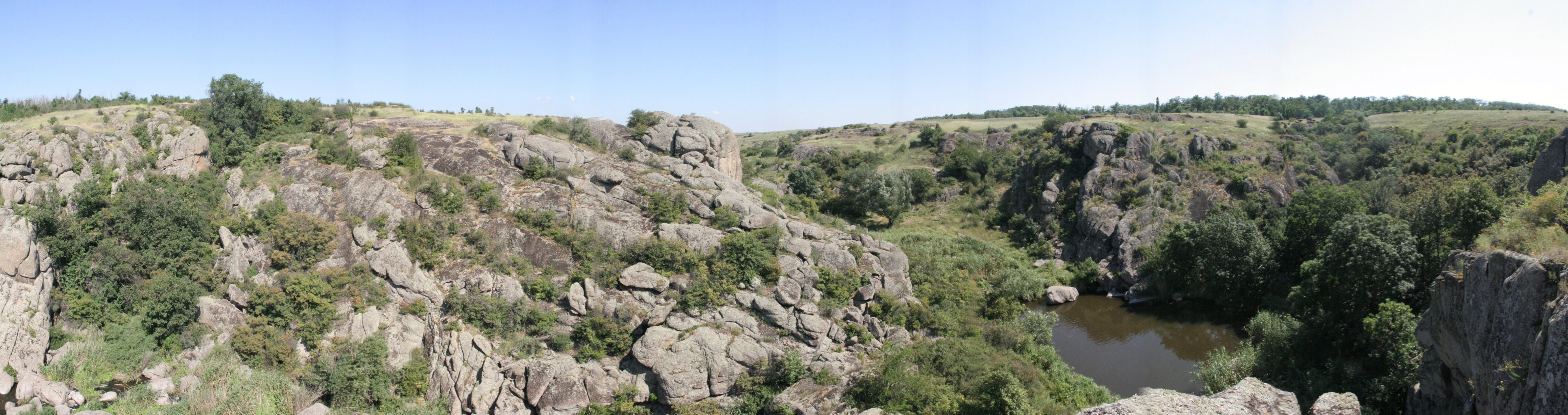 Canon EOS 500D